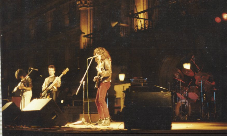 Kie 13 en la Plaza Mayor de Salamanca 1984